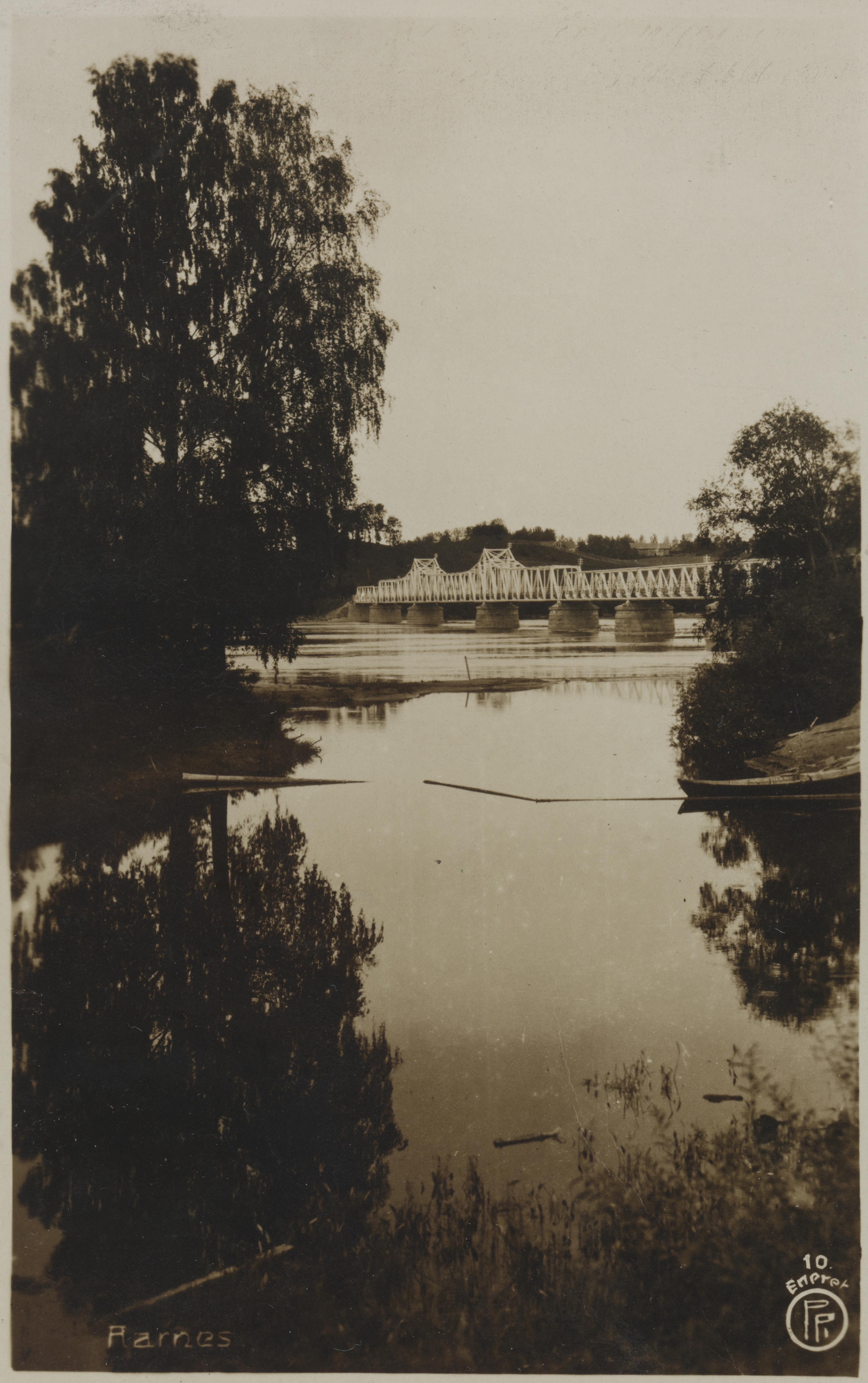 Bildet er hentet fra Nasjonalbibliotekets bildesamling Årnes, Nes, Akershus